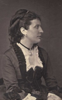 Marie Favart